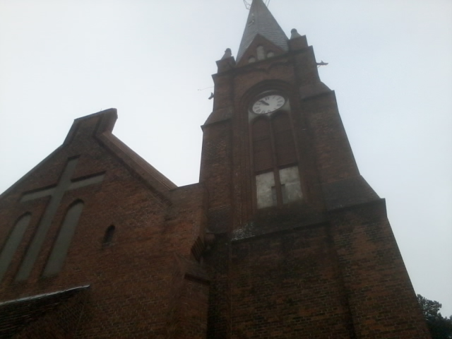 Kościół Matki Boskiej Częstochowskiej w Krzywiźnie